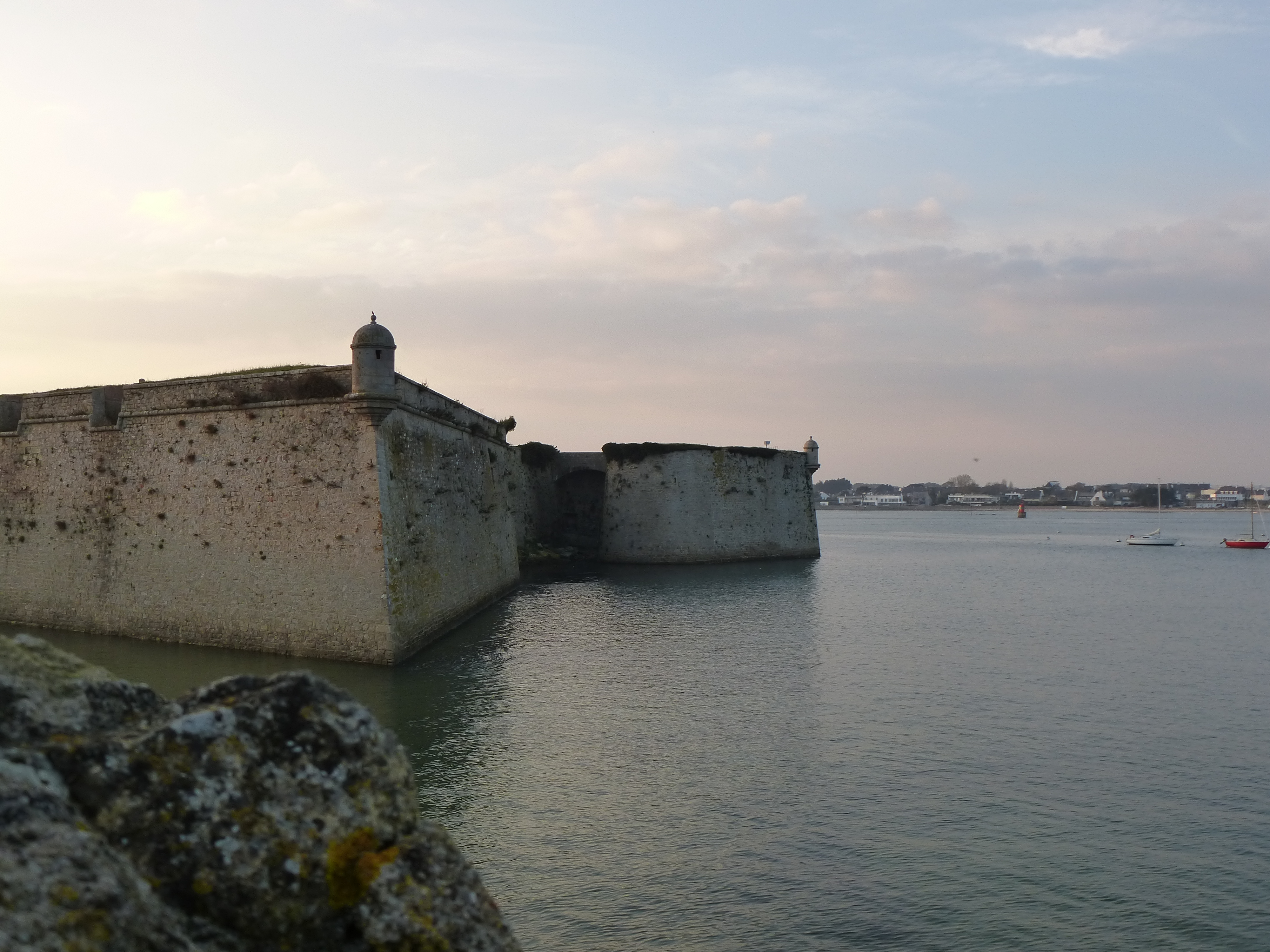 la citadelle de port louis